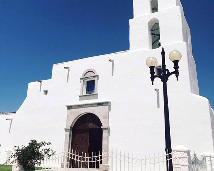 Templo de San Lorenzo, edificado a mediados del siglo XVII, en San Lorenzo, Chihuahua.